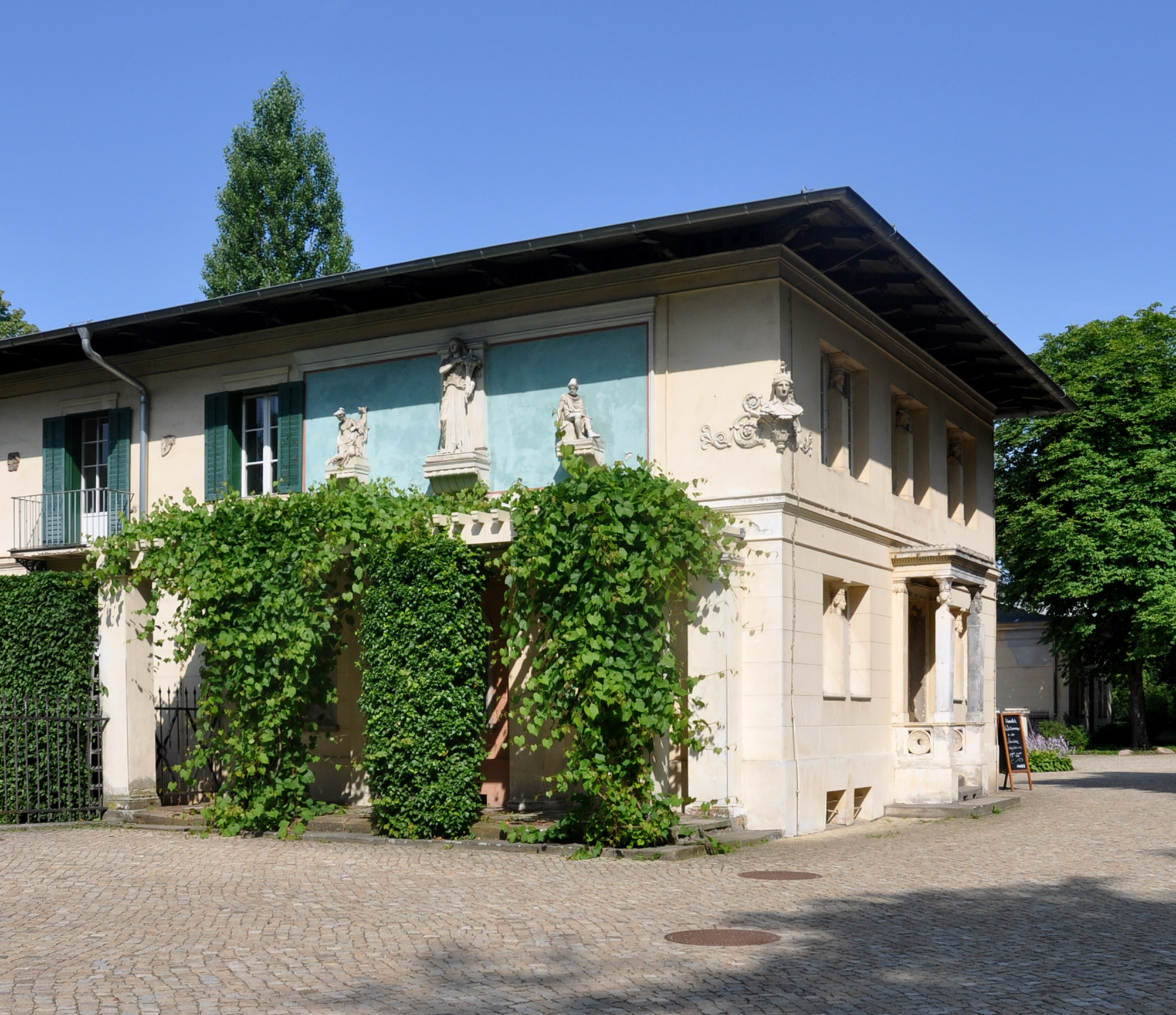 Kavalierflügel, Weinlaube und Eingang zur "Inspektorwohnung" (Kastellan)